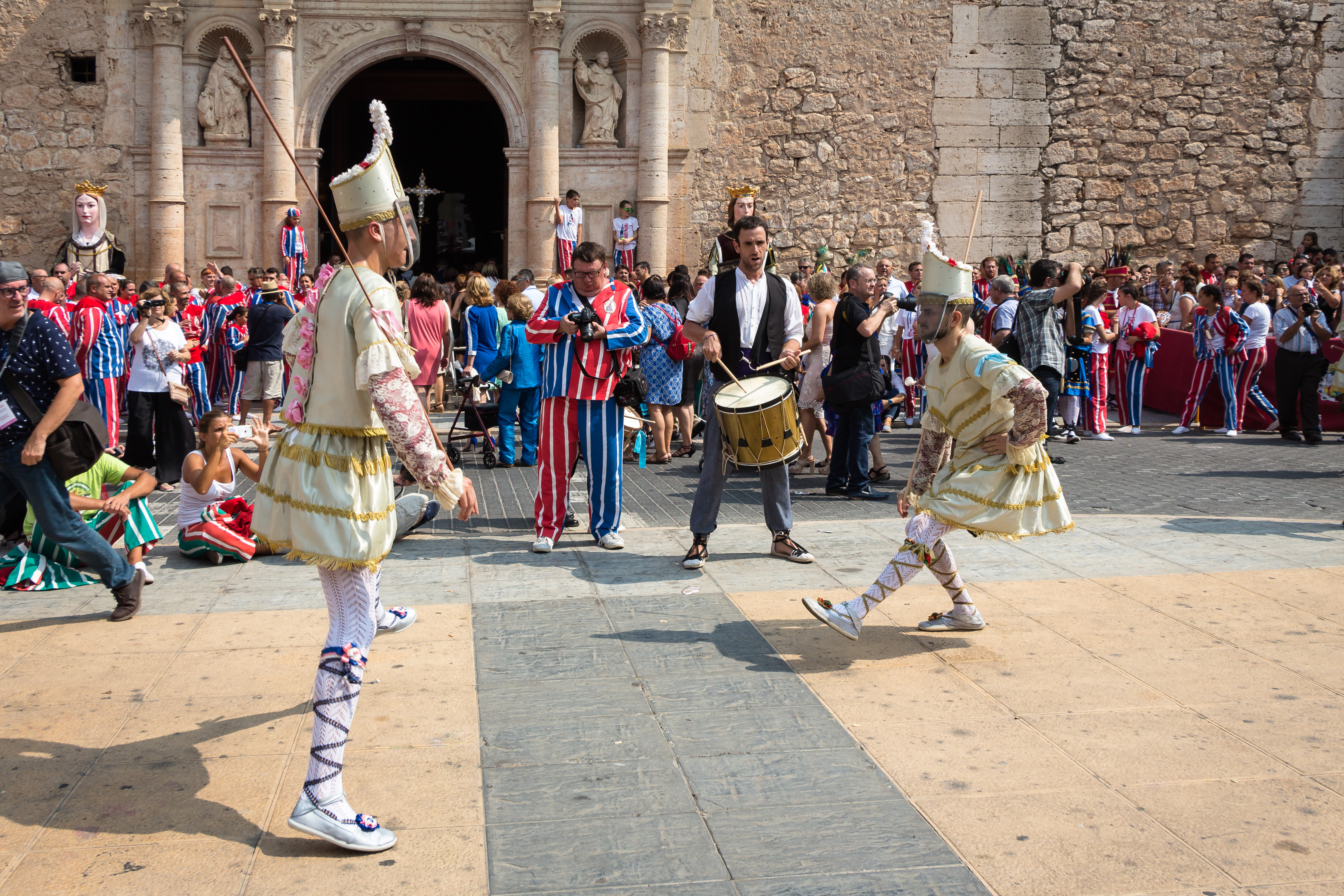 Els Tornejants es un baile grave y serio de orígenes guerreros y, junto a la Muixeranga, el más característico de la fiesta. This is a photography of a Folklore festival in Spain (Wikidata id Q3290365).